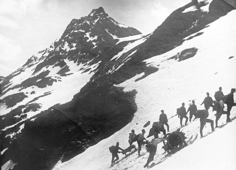 Österreichische Gebirgsartillerie bei Manöverübungen in den Tiroler Bergen. Die Artilleristen bringen ihre Geschütze auf Skirodeln in den Tiroler Bergen in Stellung.